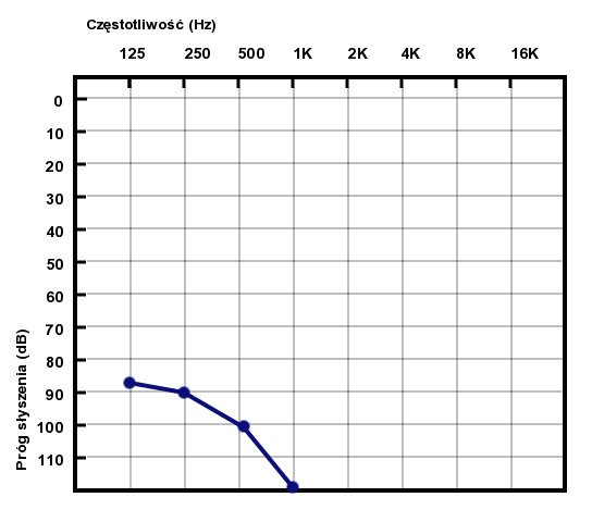 Audiogram przedstawiający progi słyszenia w przypadku głębokiego niedosłuchu o typie odbiorczym